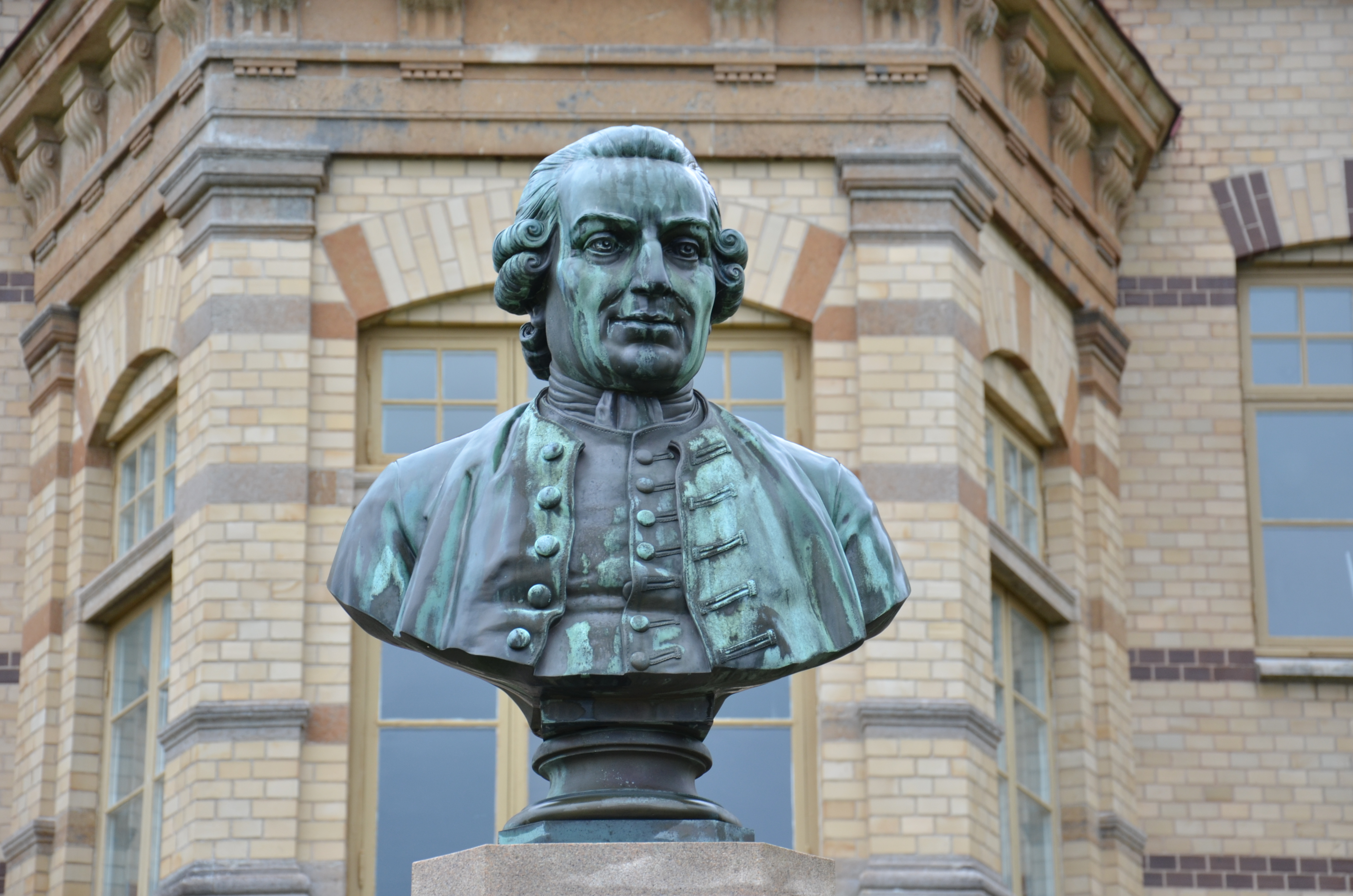 Anders Knape Hansson, byst i Gustavsberg